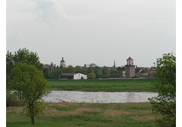 Blick auf Barby